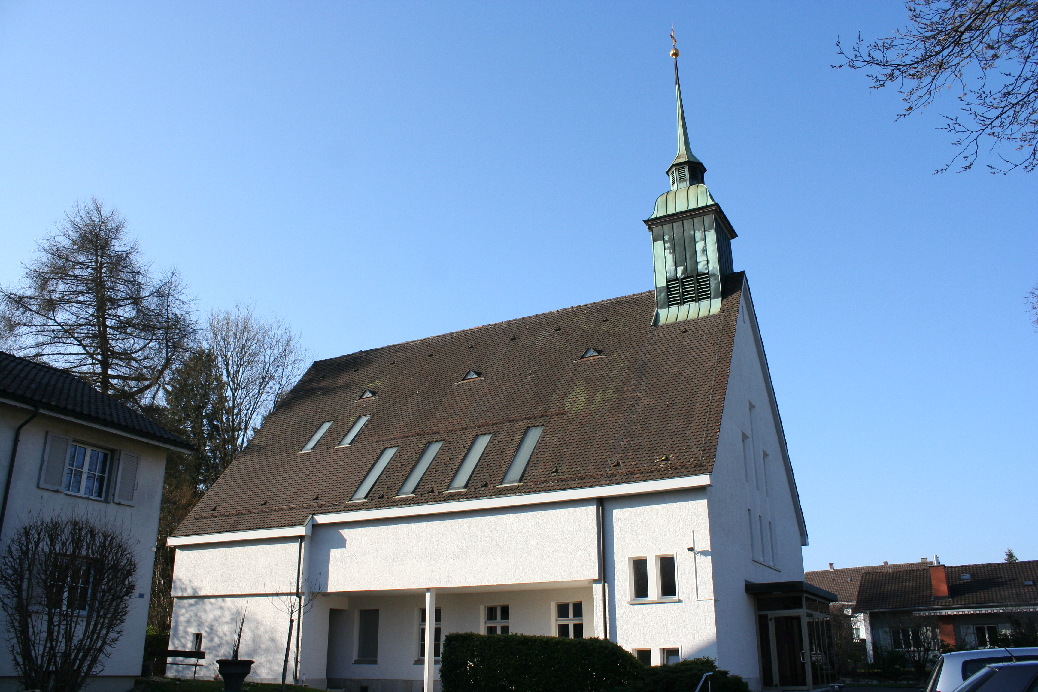 Römisch-katholische Kirche St. Josef Lindau-Grafstal, Ansicht von Süden